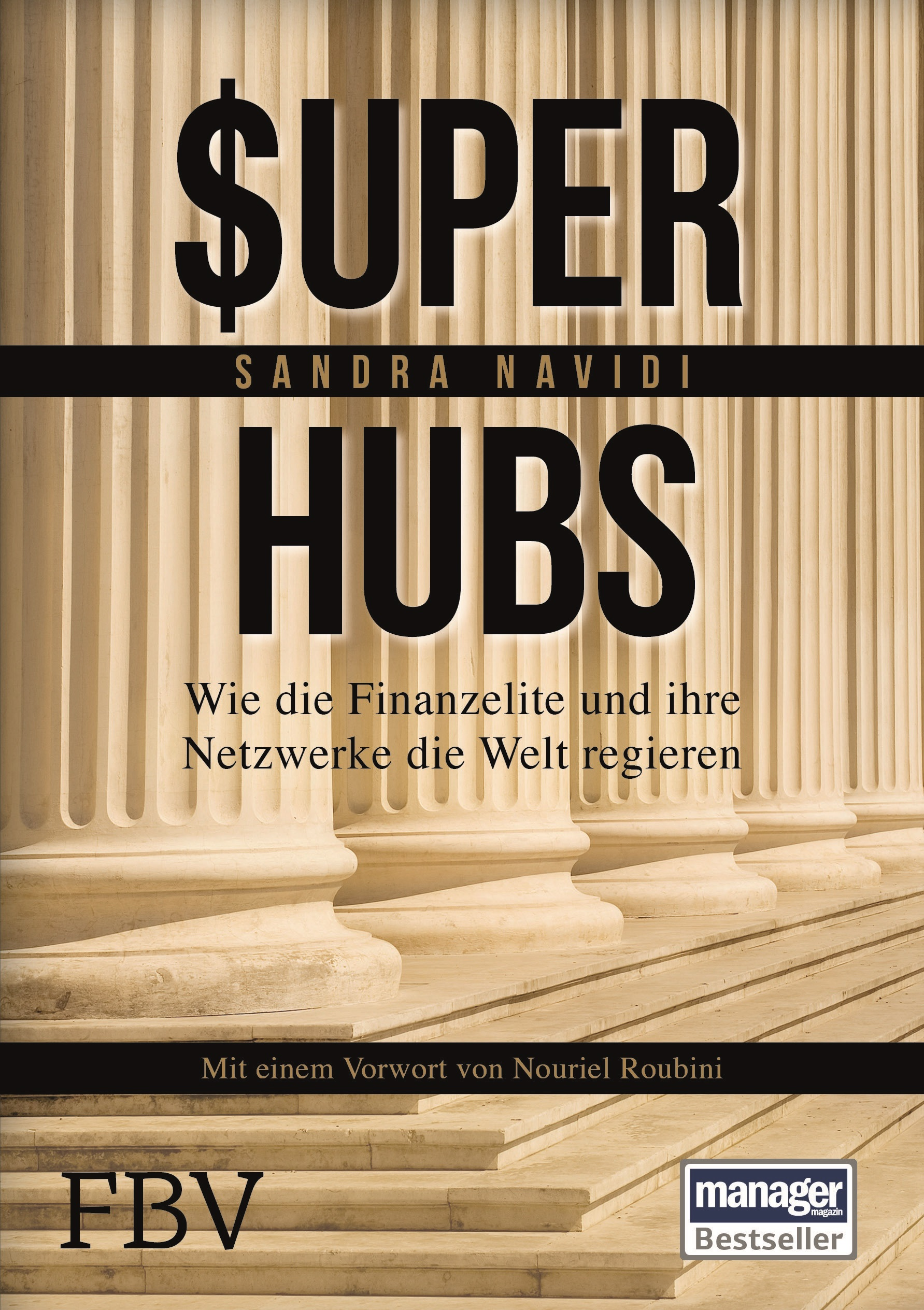 Coveransicht des Buches von Sandra Navidi: Super-hubs: Wie die Finanzelite und ihre Netzwerke die Welt regieren. FinanzBuch Verlag, München 2016, ISBN 9783862488681.